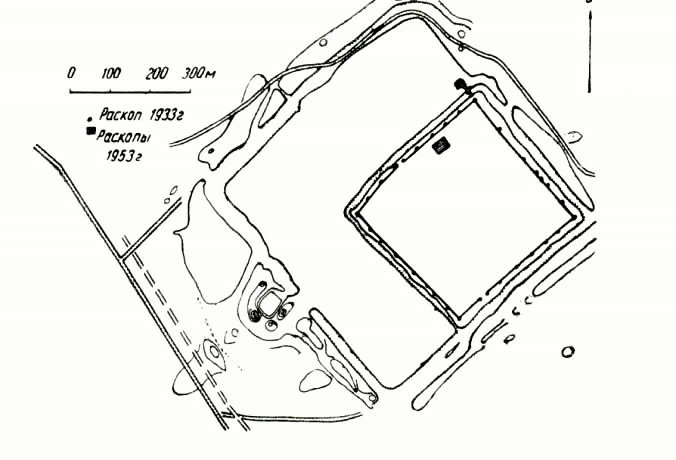 Beyləqan (Örənqala) qalasının planı